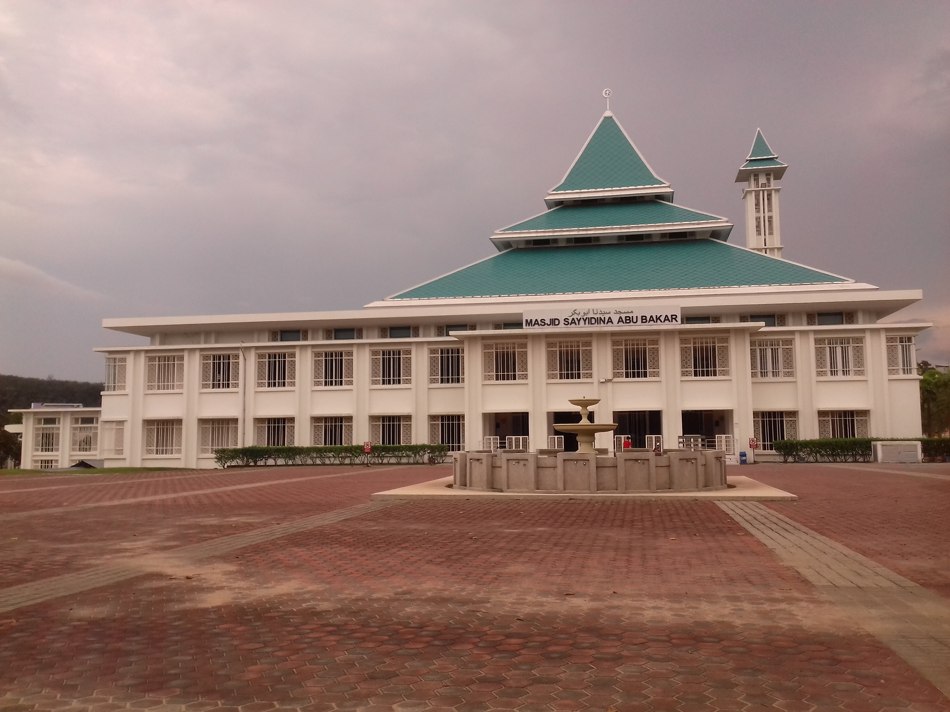 Masjid Sayyidina Abu Bakar dari arah utara